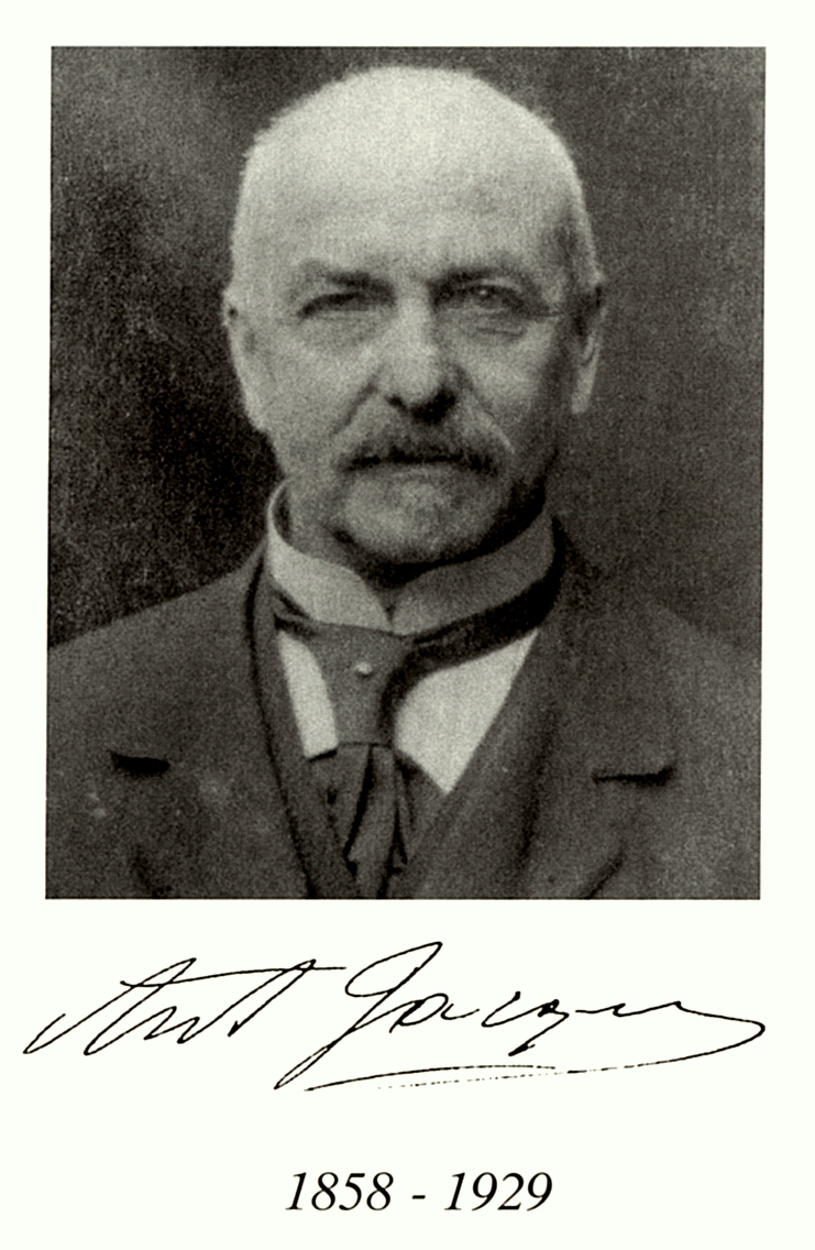 Antoine Jacques, Gründer der Chocolaterie Jacques